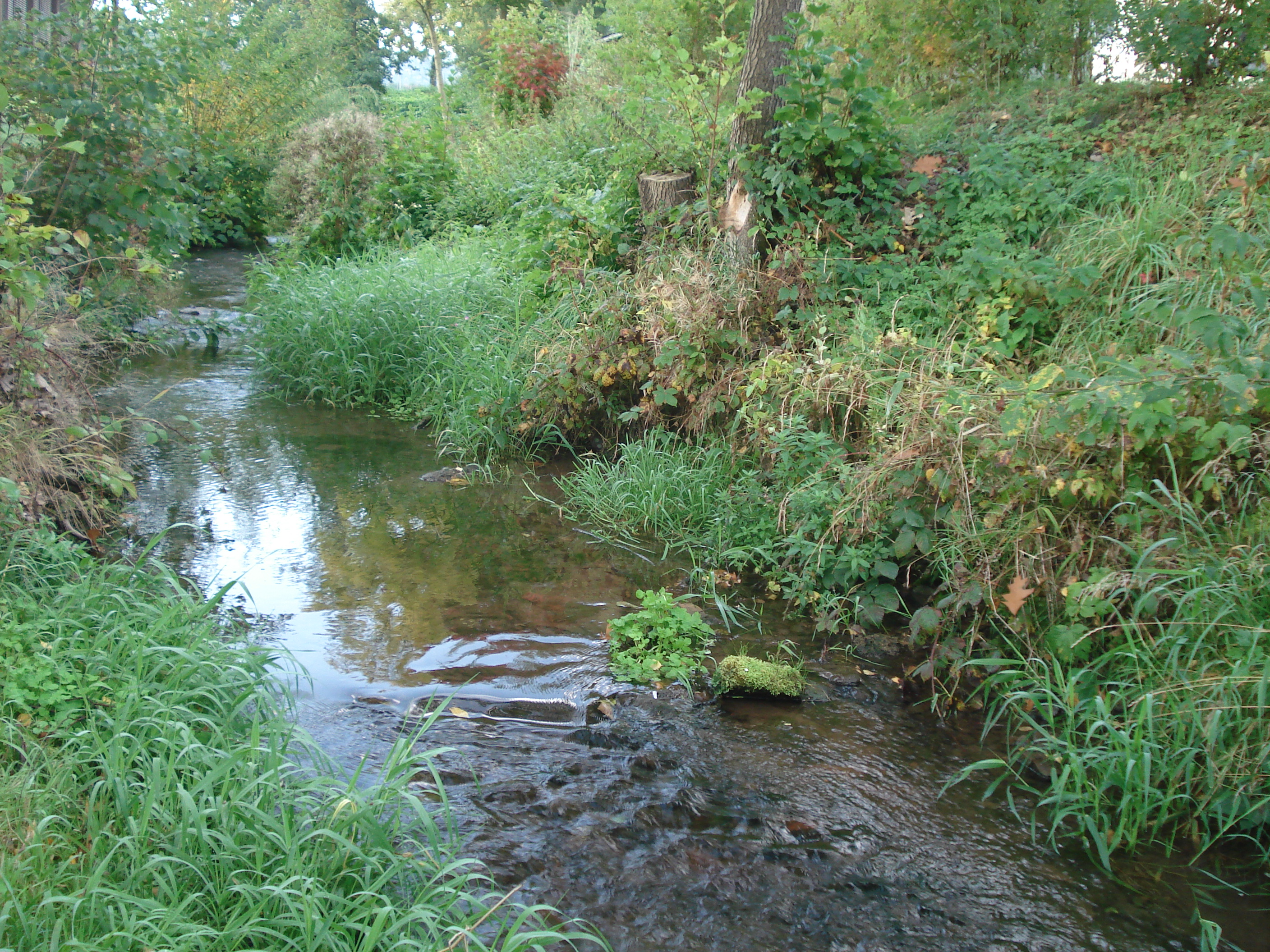 Der Eiderbach in Rippberg